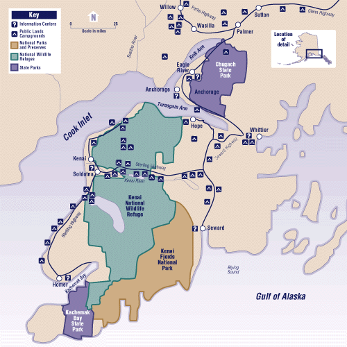 Map of Alaska: Kenai Peninsula